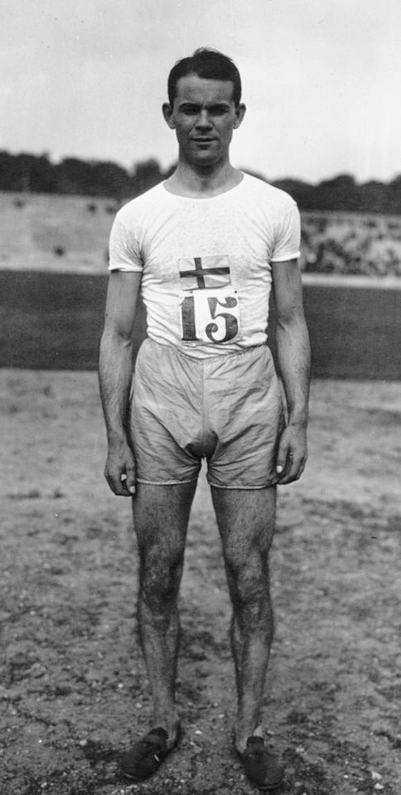 Stade Pershing : match athlétisme France-Suède : Abrahamson (Suédois), gagnant du saut en longueur (portrait) : [photographie de presse] / Agence Meurisse